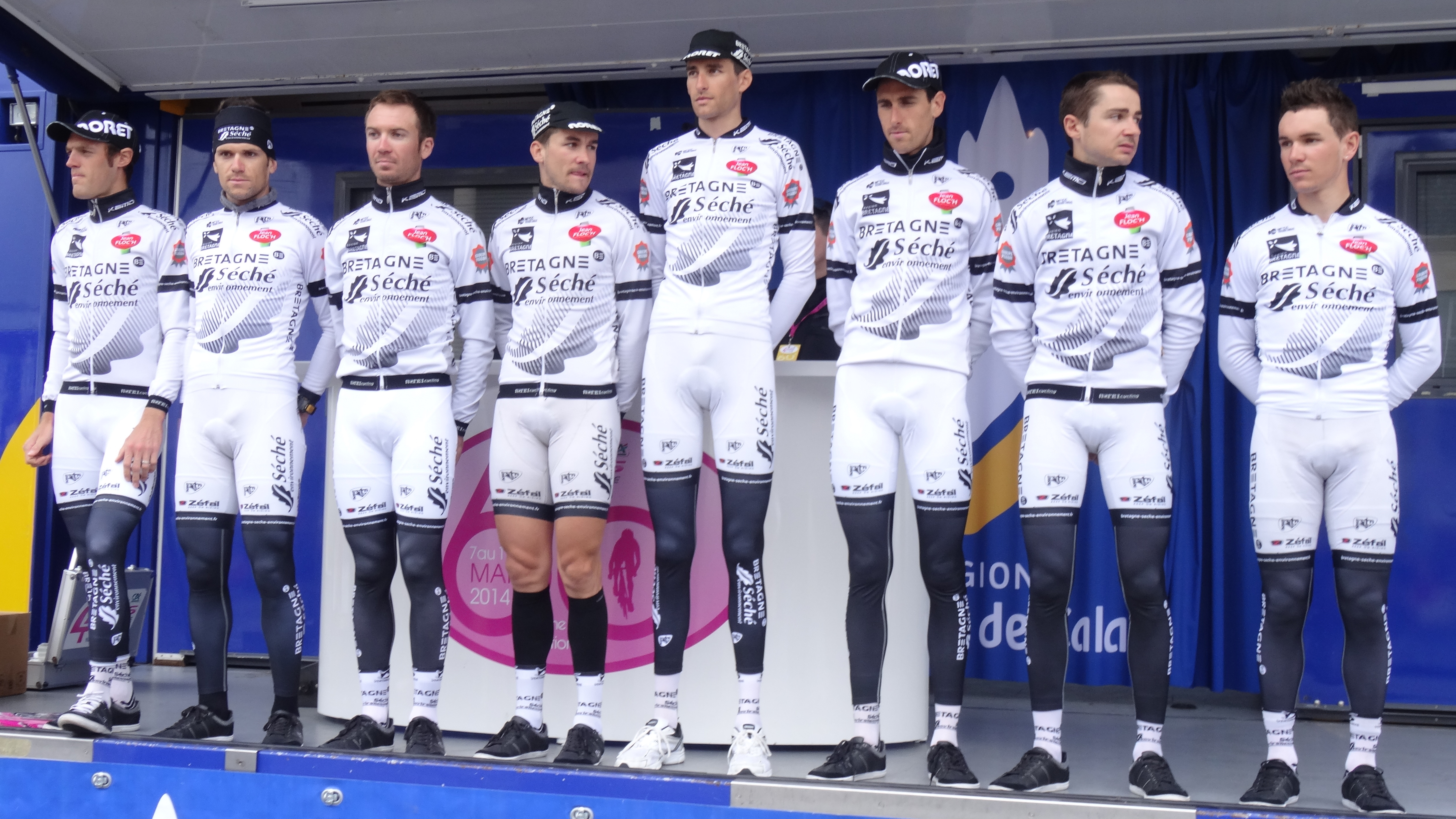 Reportage photographique réalisé le jeudi 8 mai 2014 au départ de la deuxième étape de l'édition 2014 des Quatre jours de Dunkerque à Hazebrouck, Nord, Nord-Pas-de-Calais, France. Depicted people: Arnaud Gérard, Benjamin Le Montagner, Pierre-Luc Périchon, Erwann Corbel, Florian Guillou, Jean-Marc Bideau, Christophe Laborie and Clément Koretzky Depicted team: Bretagne-Séché Environnement